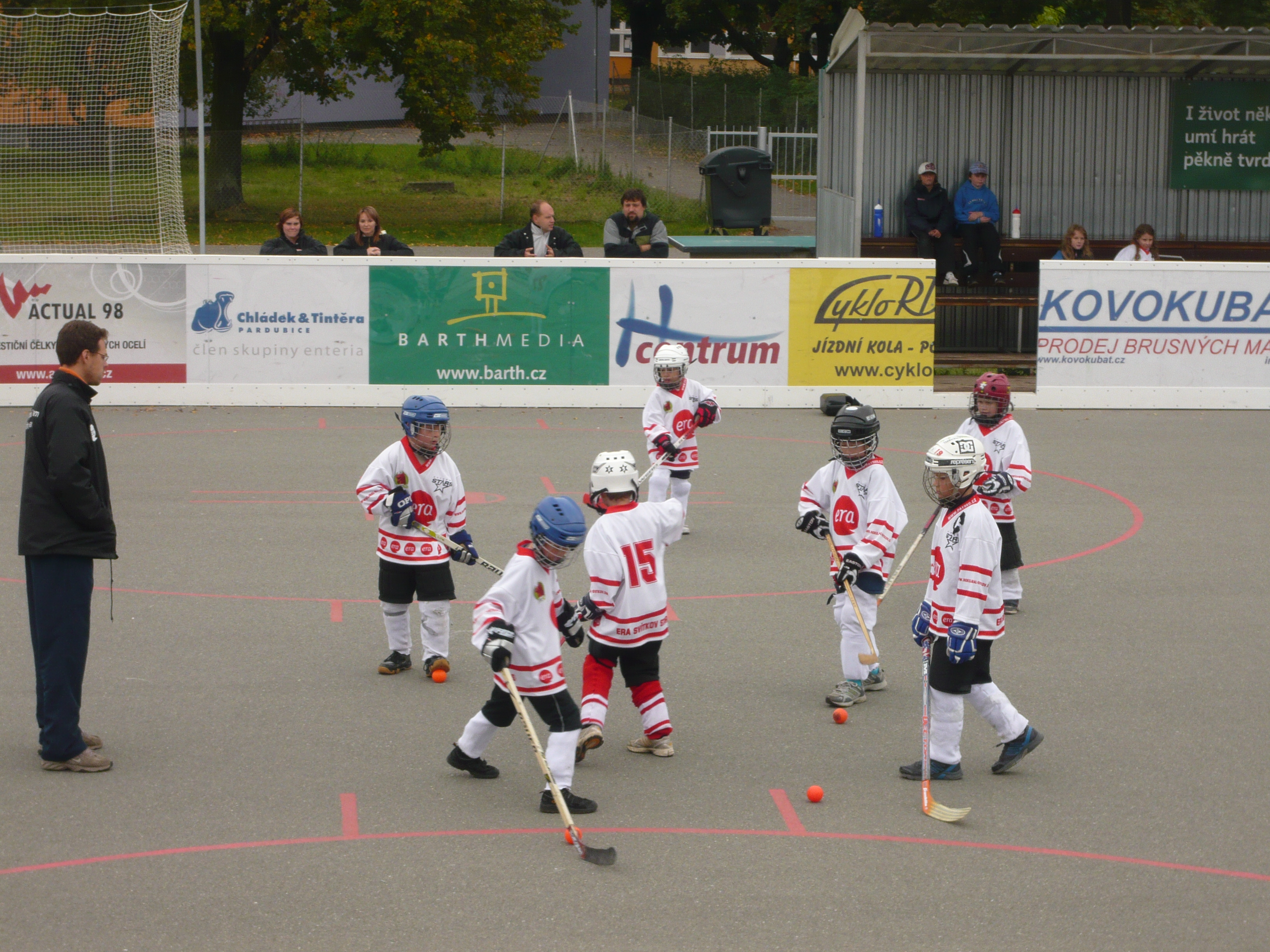 Přípravka hokejbalového klubu Svítkov Stars